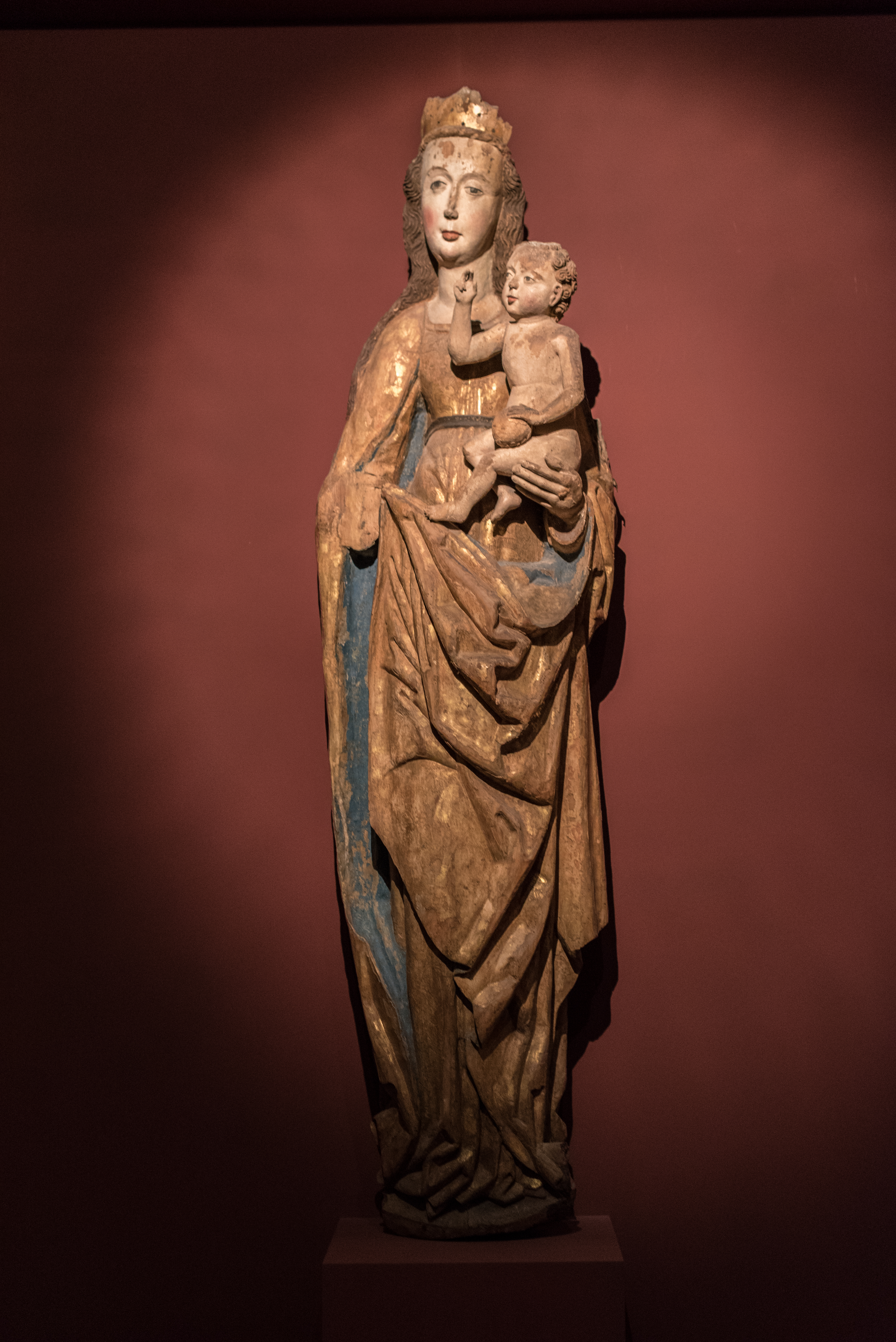 Naumburg, Dom, Domschatzkammer, Ehemaliger Westchoraltar